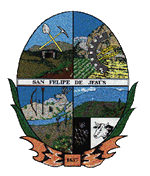 Escudo del municipio sonorense.